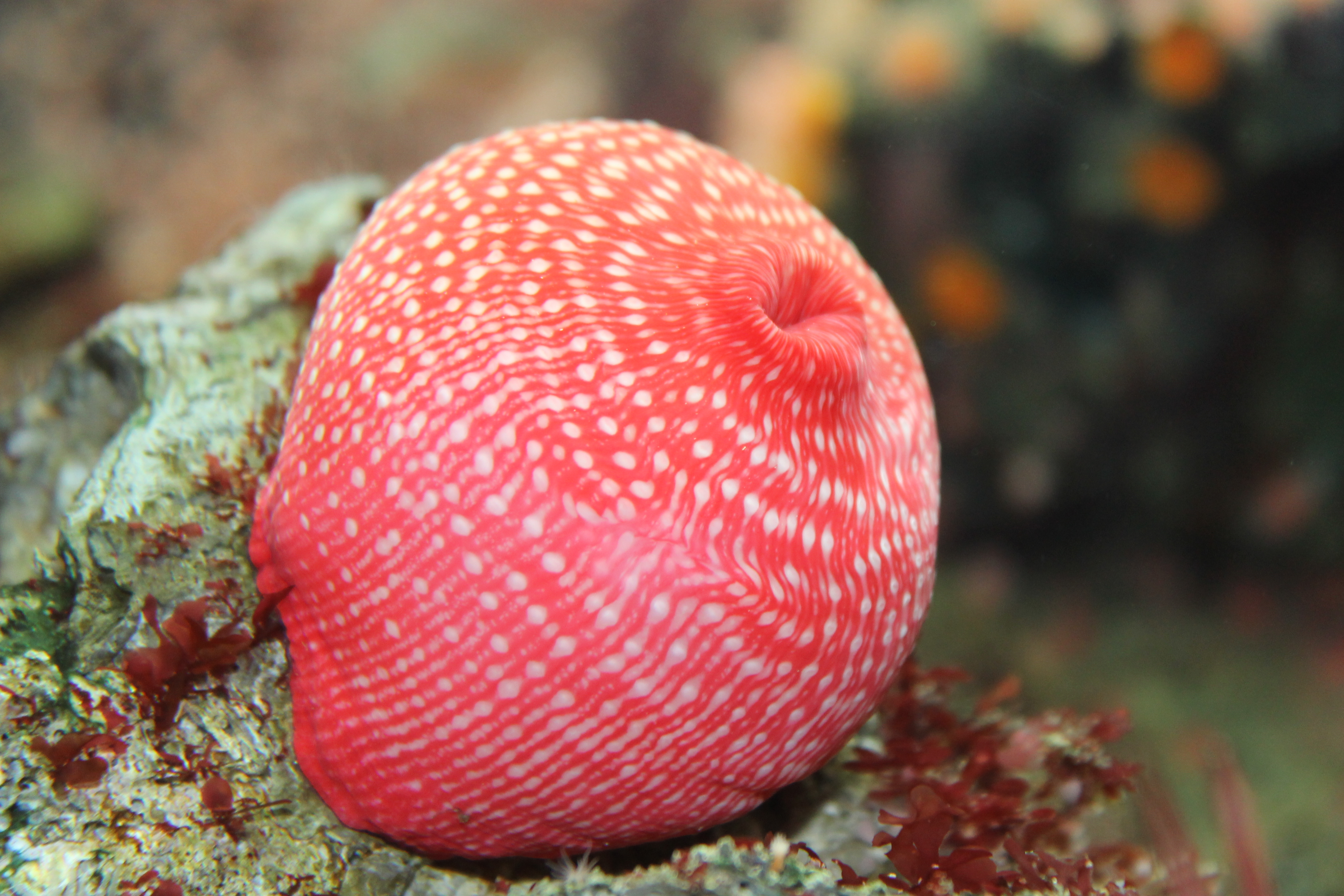 Fotografiert im Zoo Basel, Aquarium ist mit "Seeanemonen, Urticina spp." angeschrieben